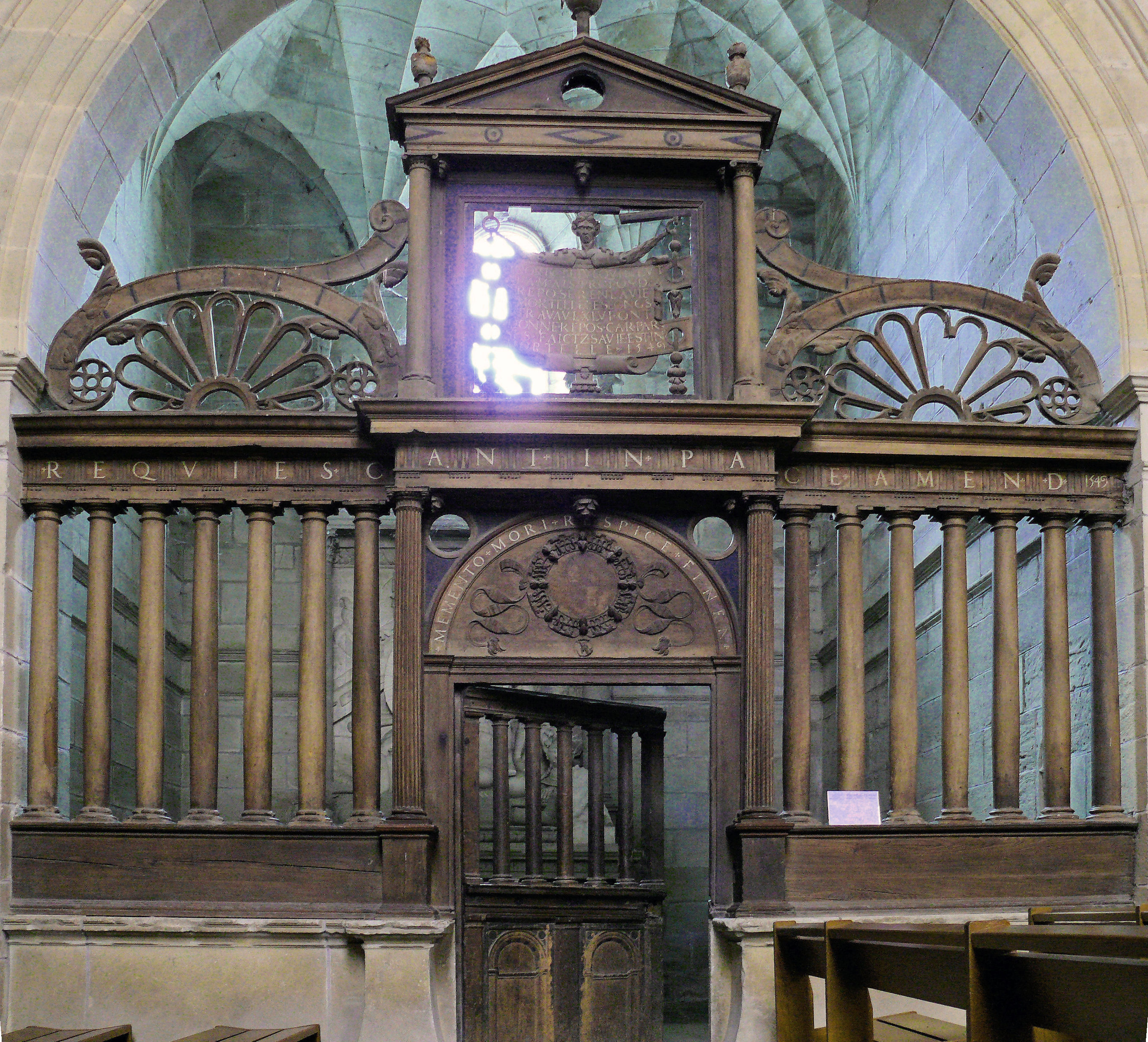 Assier - Chapelle funéraire de Galiot de Genouillac à l'église Saint-Pierre - Clôture